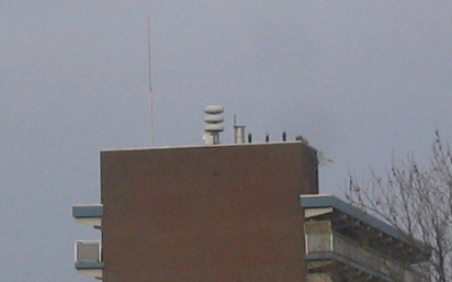 Installatie voor luchtalarm bovenop flat. Eigen foto (2004-03-14), vrij te gebruiken.